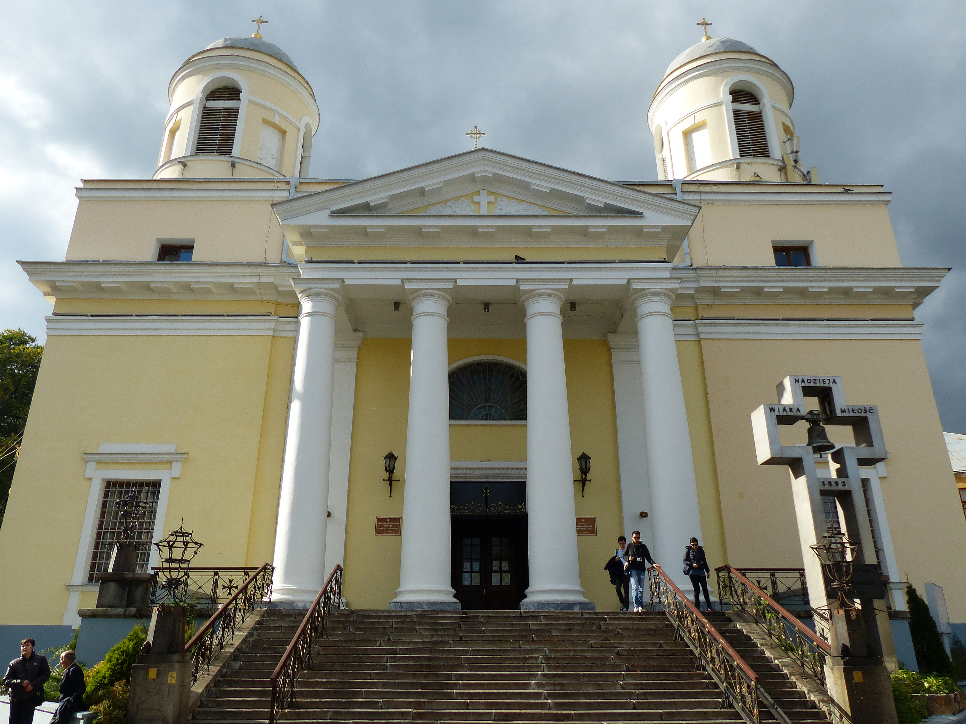 Костьол Святого Олександра, Київ, Костьольна вул., 17